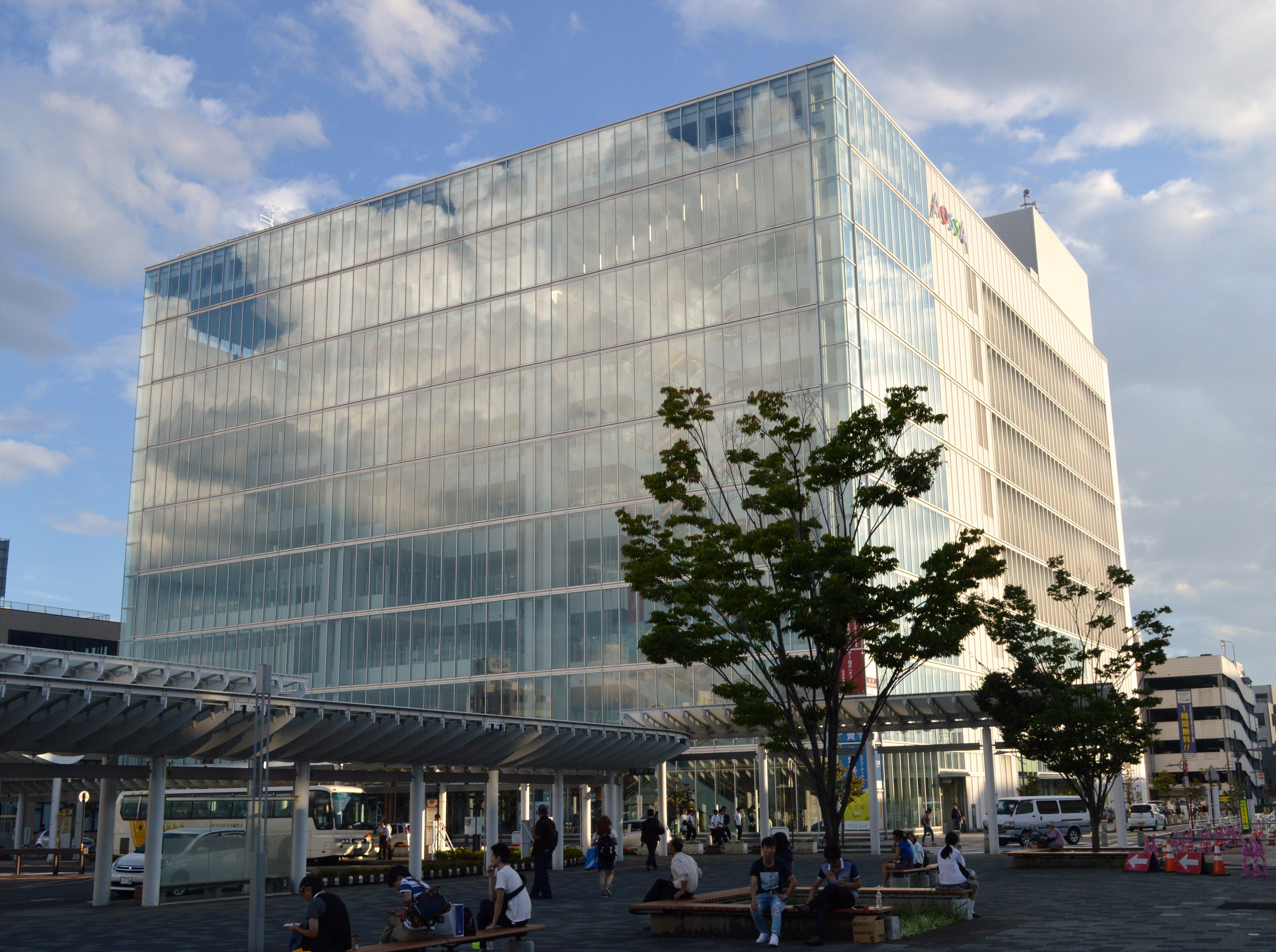 JR福井駅東口再開発ビル「AOSSA」。